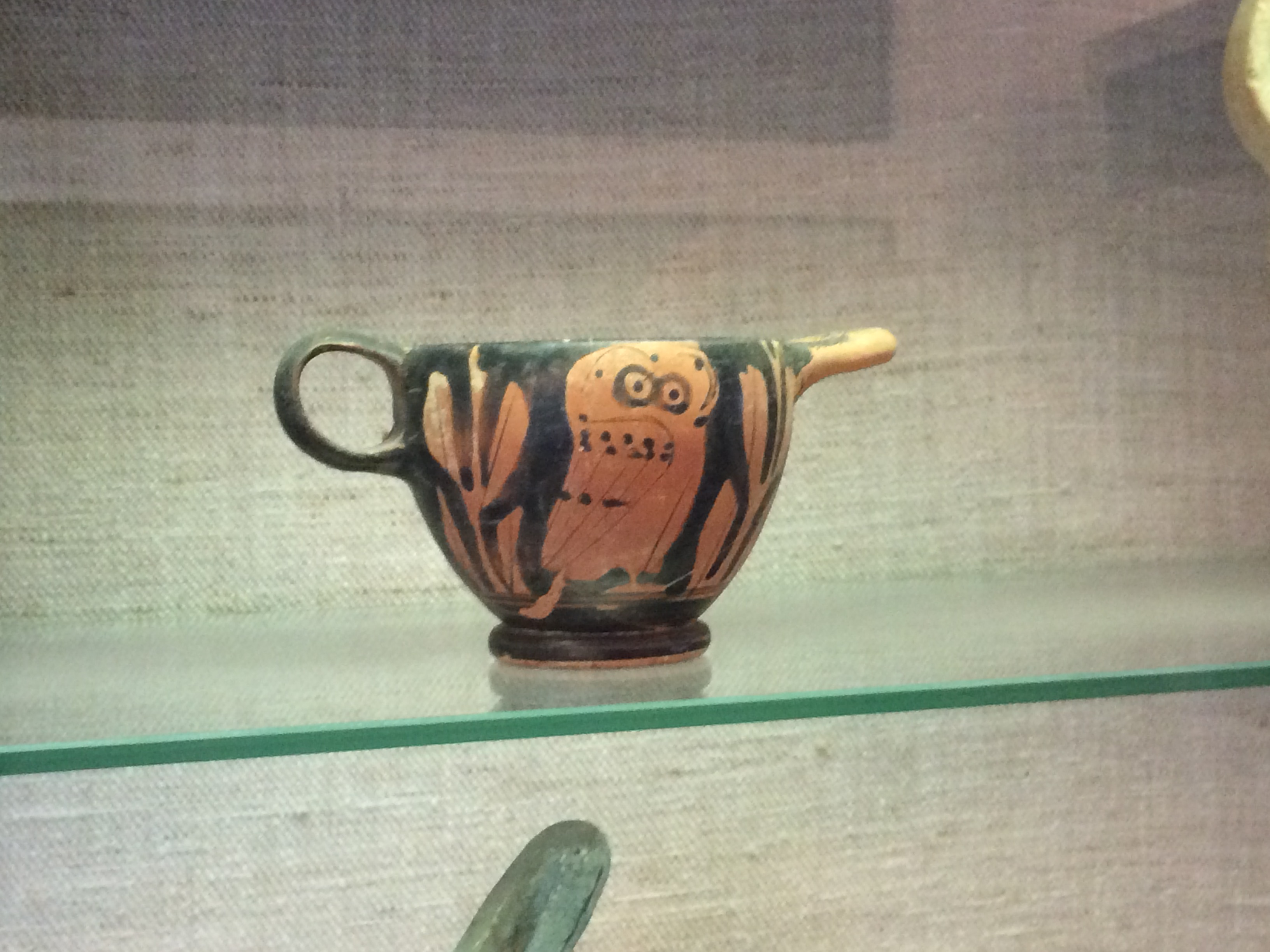 Vase à boire du Vème siècle av-J.C.